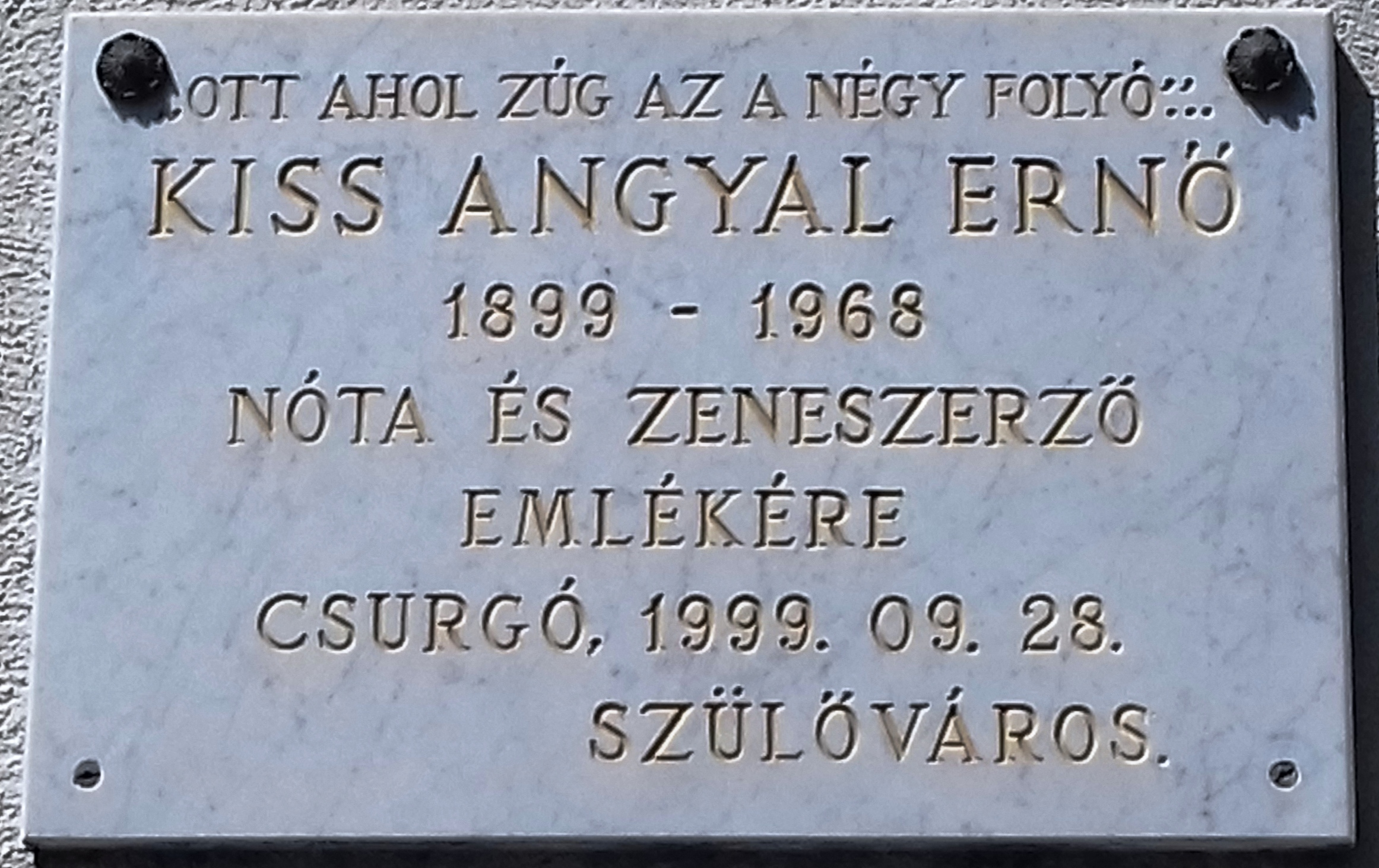 Kiss Angyal Ernő emléktáblája szülővárosában, Csurgón